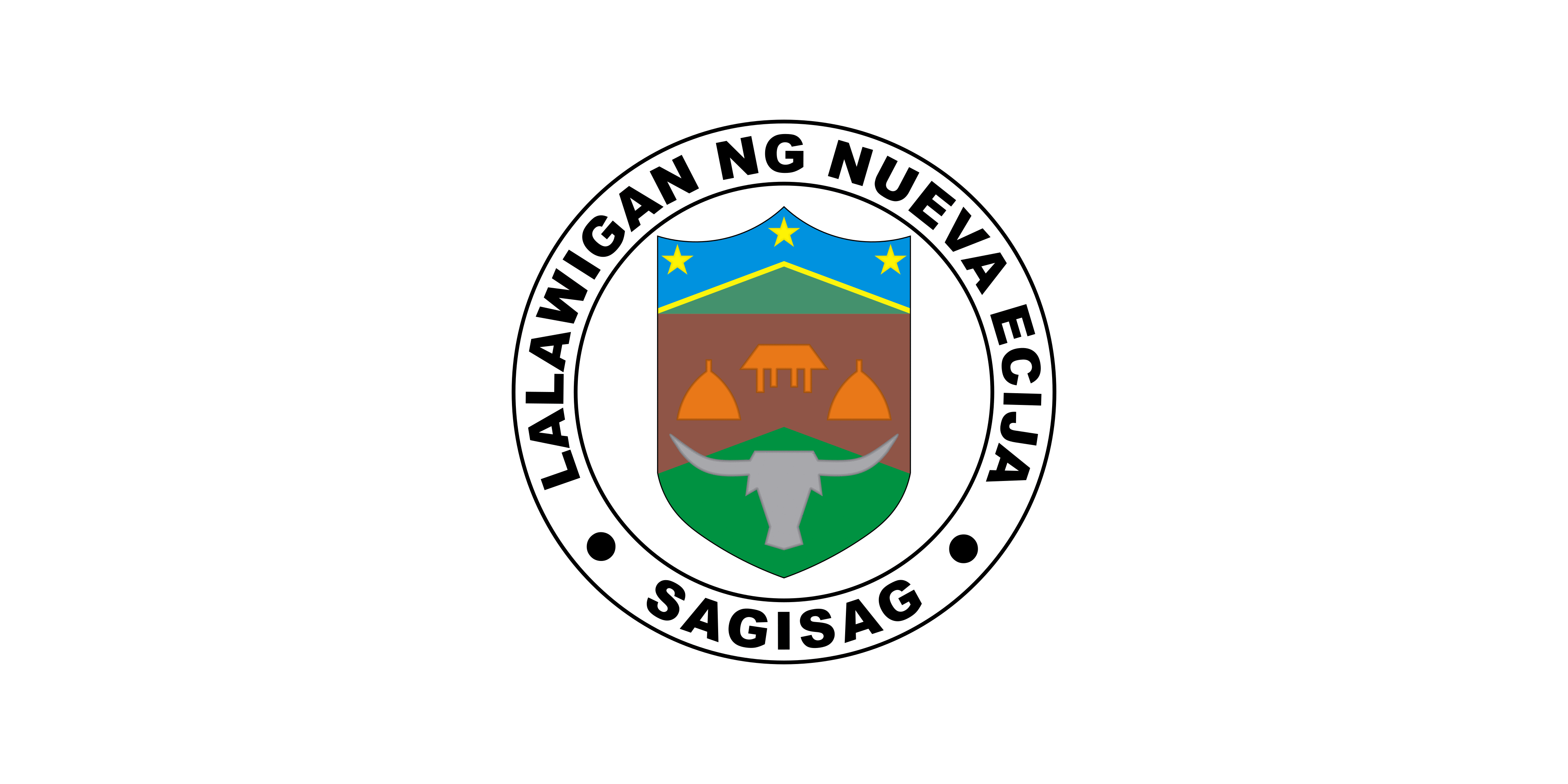 Dit materiaal is afkomstig van of en is door de auteur Jaume Ollé als GFDL beschikbaar gesteld, zie de toestemmingsemail. Hiermee vervallen de strictere voorwaarden in de disclaimers op de genoemde sites.Vrijgegeven bijdrage op Flags of the World van Jaume Olle. Zie deze verklaring op de Spaanstalige Wikipedia. GNU FDL